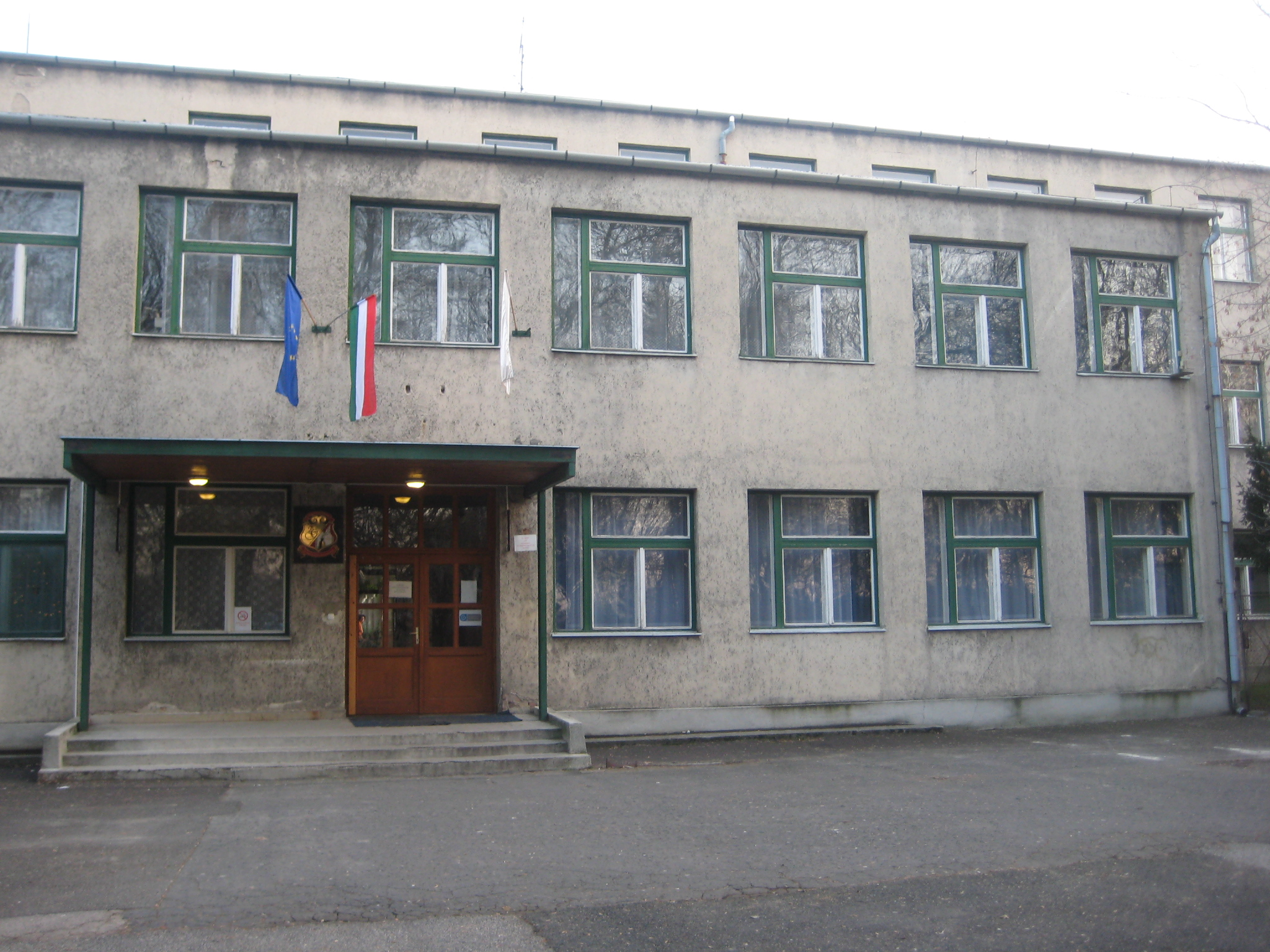 A dorogi Zsigmondy Vilmos Gimnázium főbejárata.